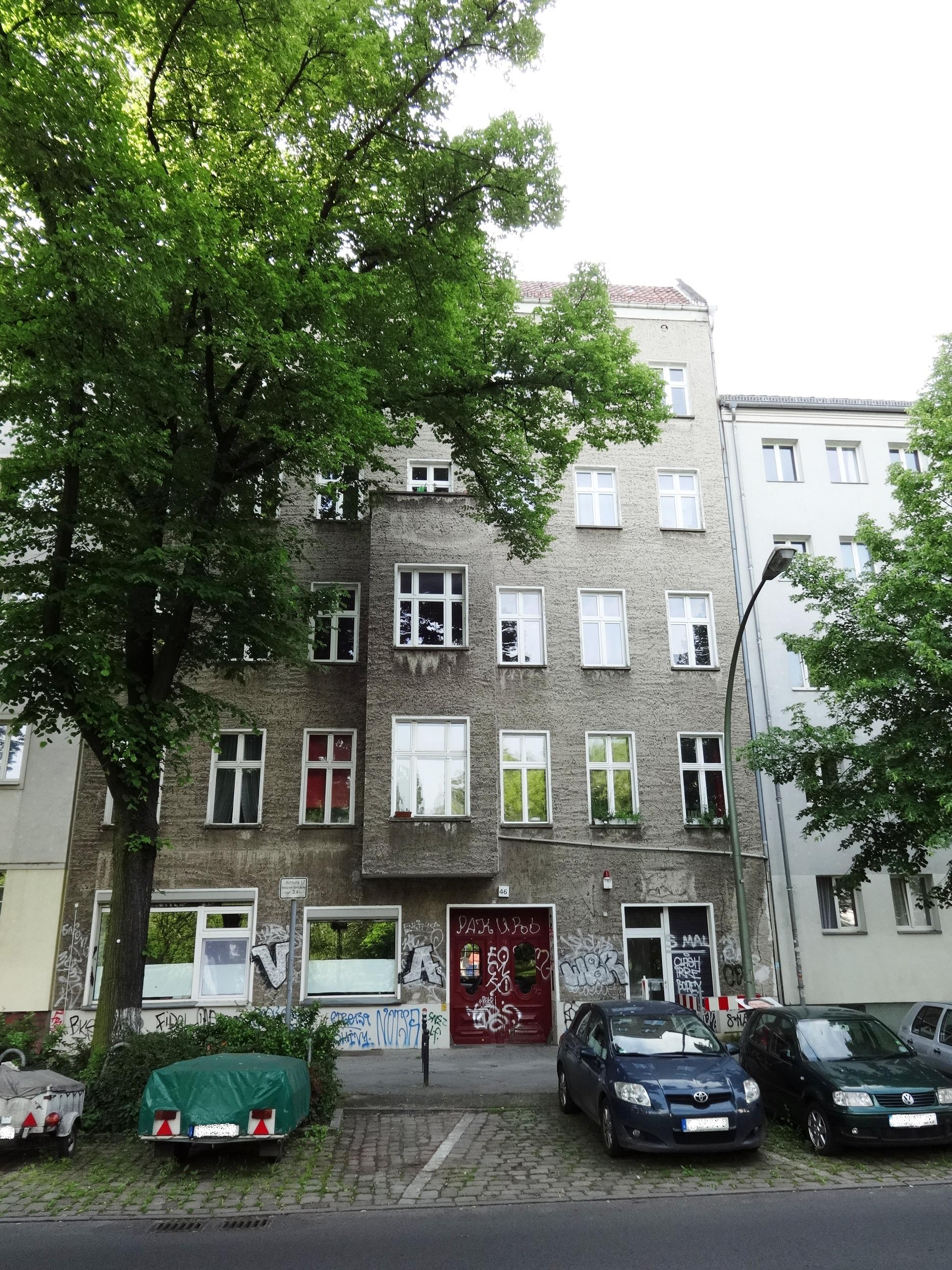 Haus des Ratszimmermeisters Robert Otto aus dem Jahr 1898 in der Lohmühlenstraße 46, eines der ersten Wohnhäuser in diesem Gebiet